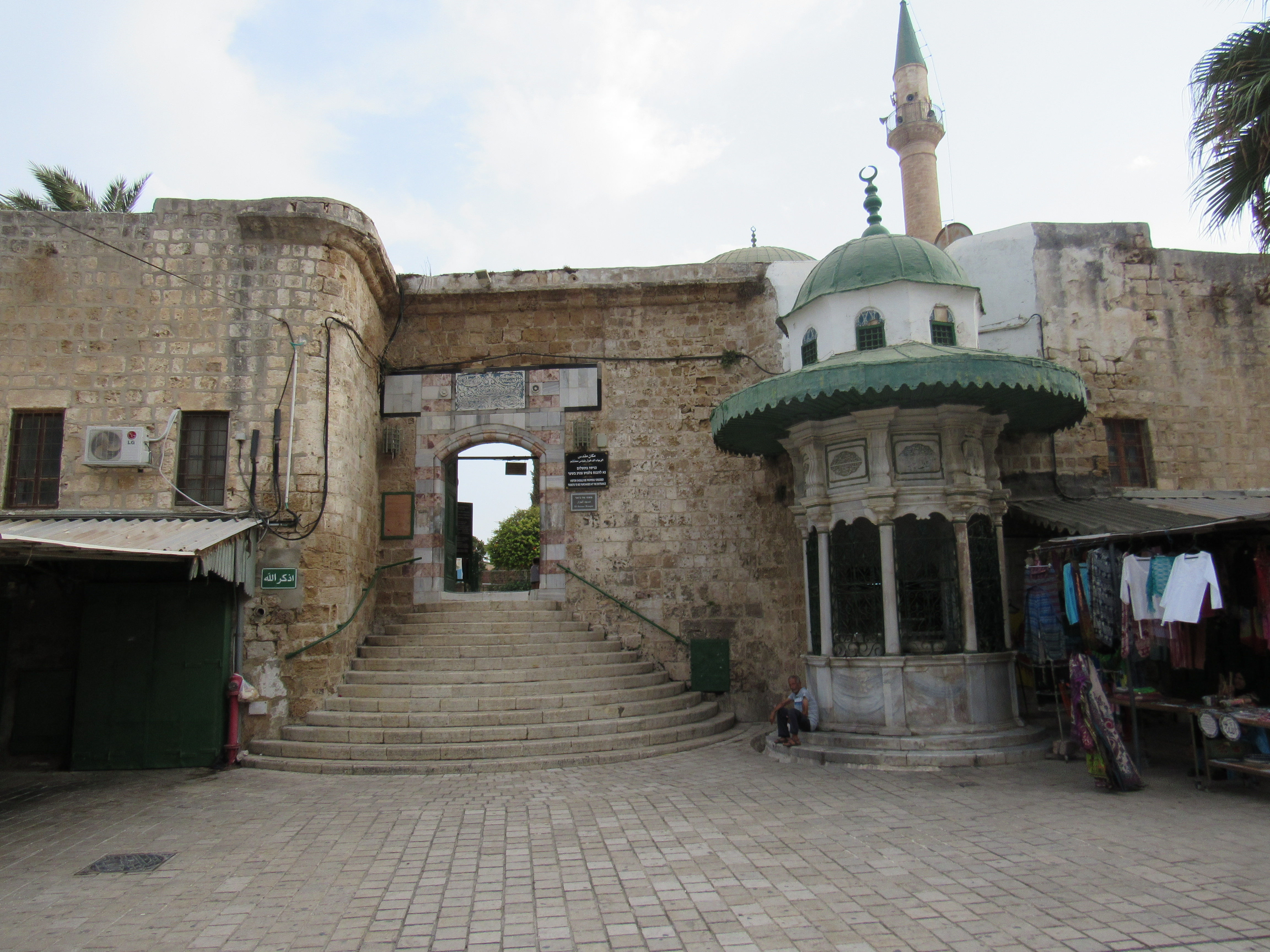 Acre